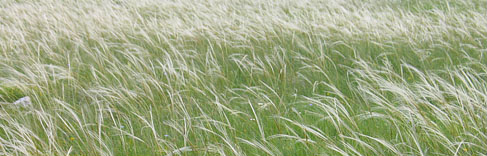 Kraški travniki. Volovja reber - flora